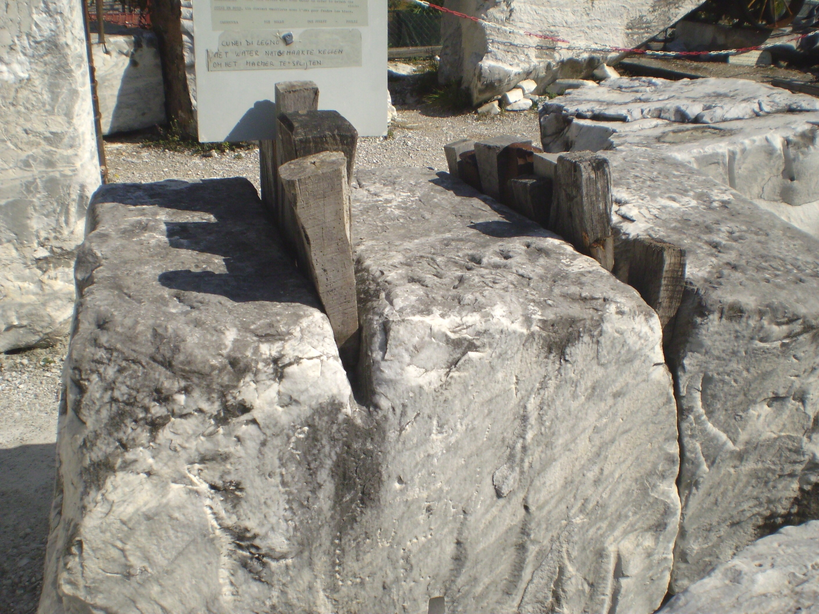 Marble block at Carrara, Province Massa-Carrara, Italy. Museo di Fantiscritti